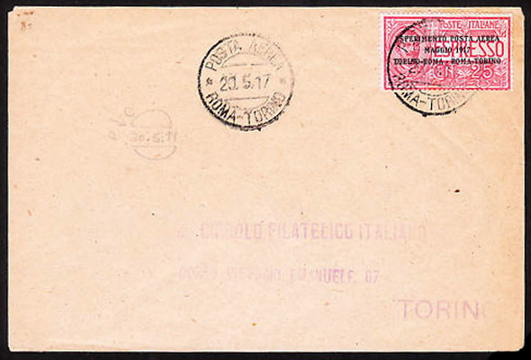 Конверт, прошедший почту по маршруту Рим-Турин, авиапочта Италии, 1917